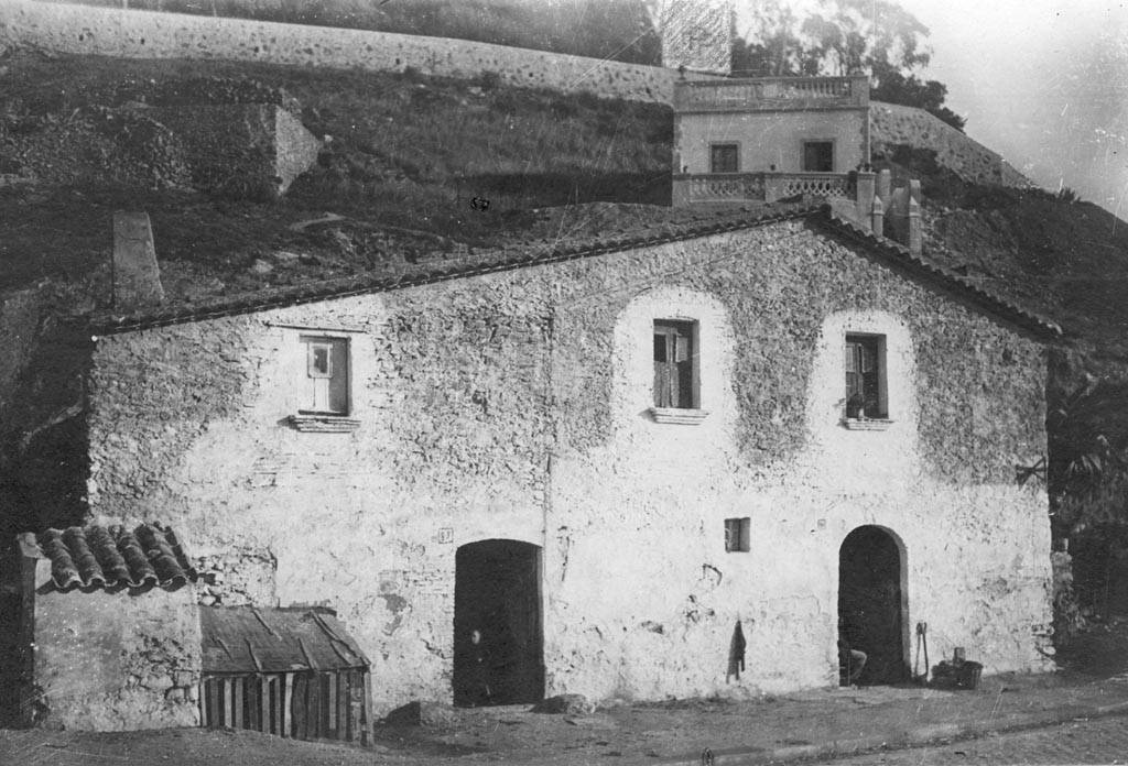 Façana de Can Sant Hilari. Jordi Audet i Viñals (Entre 1926 i 1927)